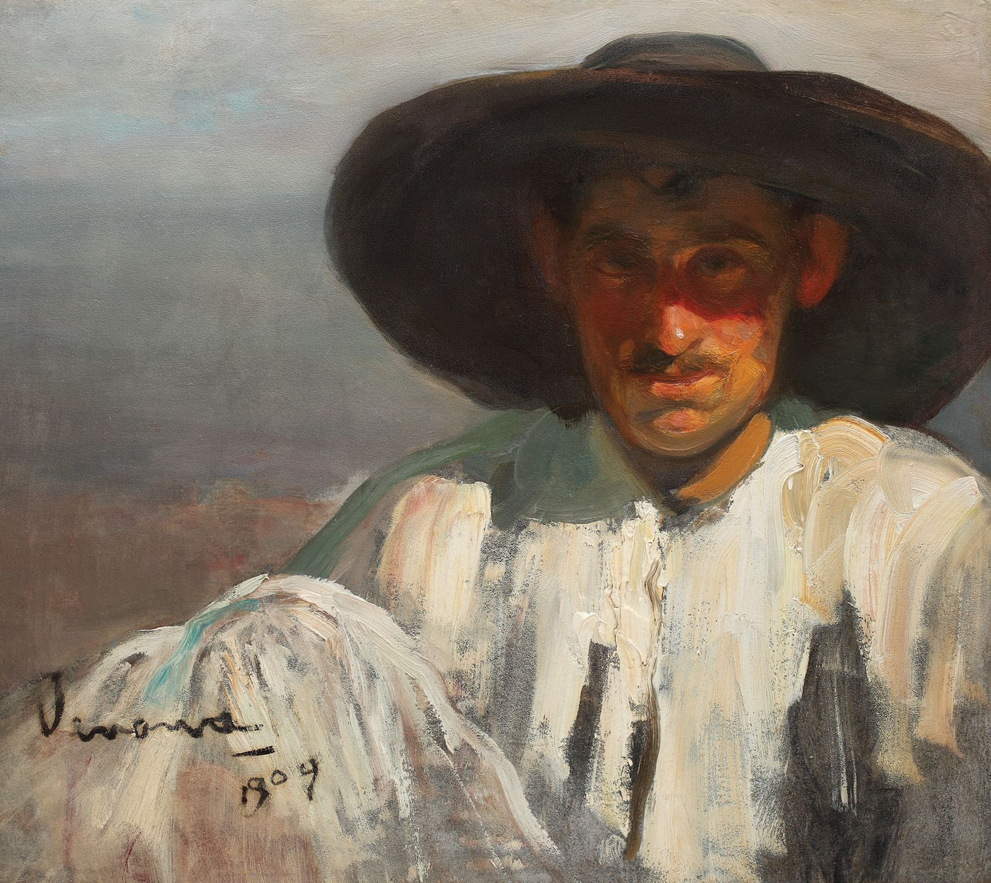 Odihna la camp